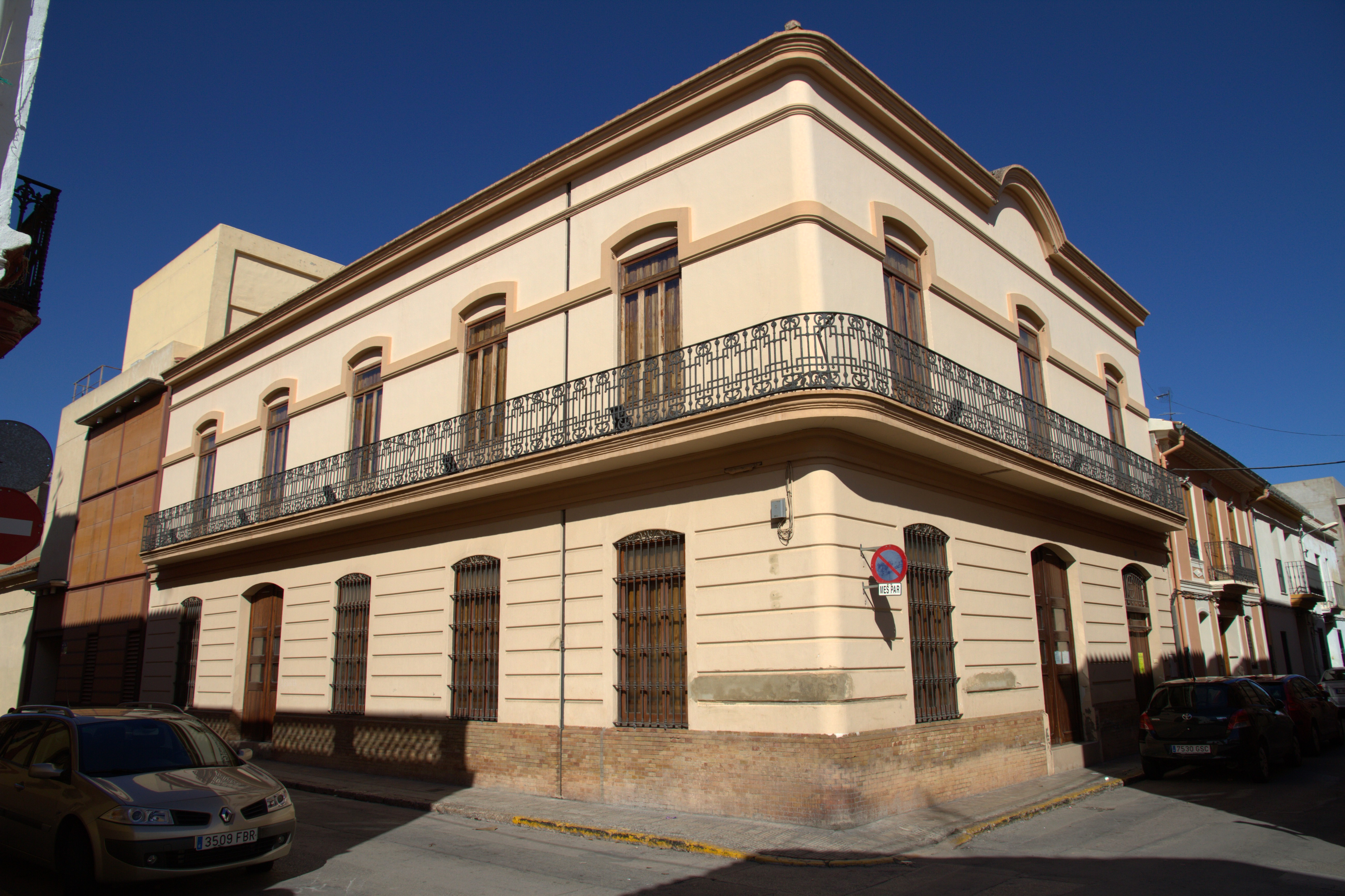 Antic Teatre. Alfara del Patriarca. Valencia 13.025-009.